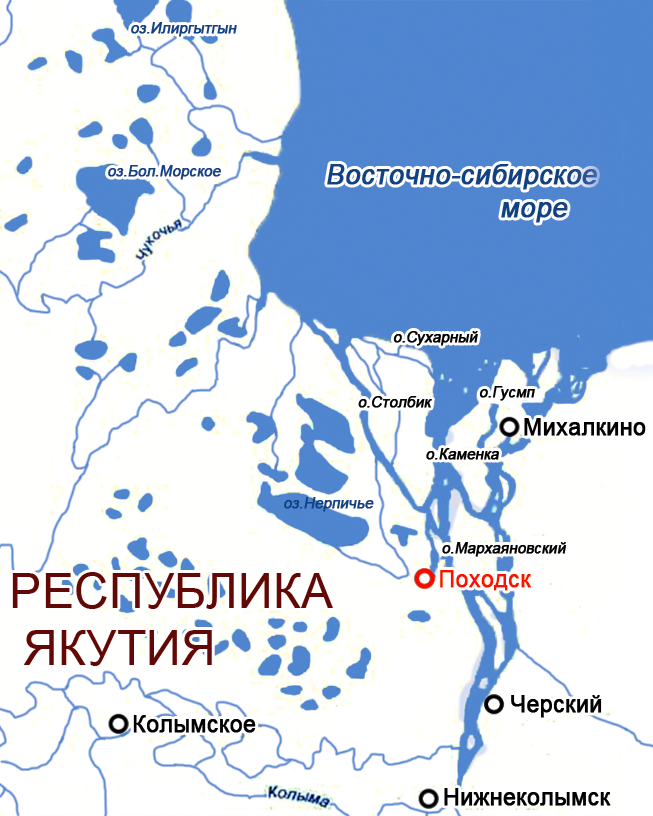 Карта низовьев Колымы